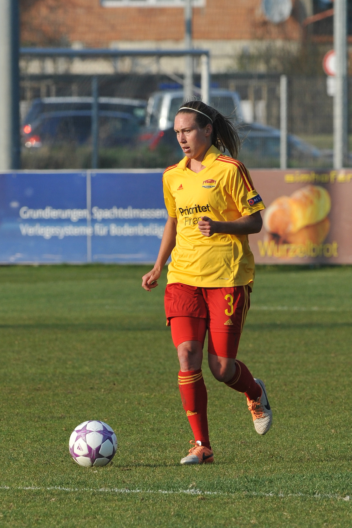 UEFA Women's Champions League 2013/14 SV Neulengbach - Tyresö FF Neulengbach, 29. März 2014 Whitney Engen